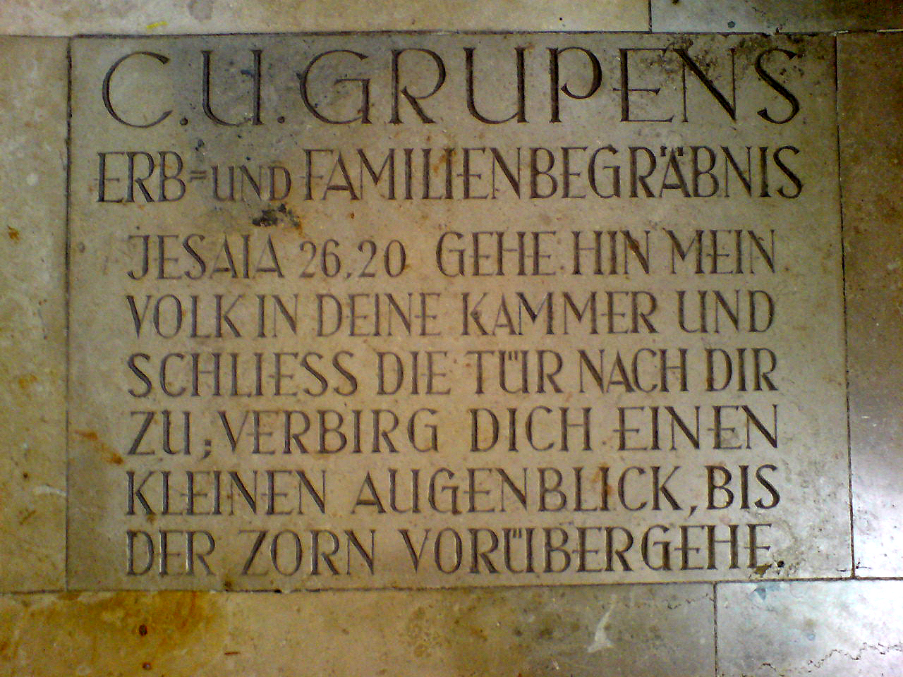 Bodenplatte in der Kreuzkirche Hannover Erb- und Familienbegräbnis Christian Ulrich Grupens ...